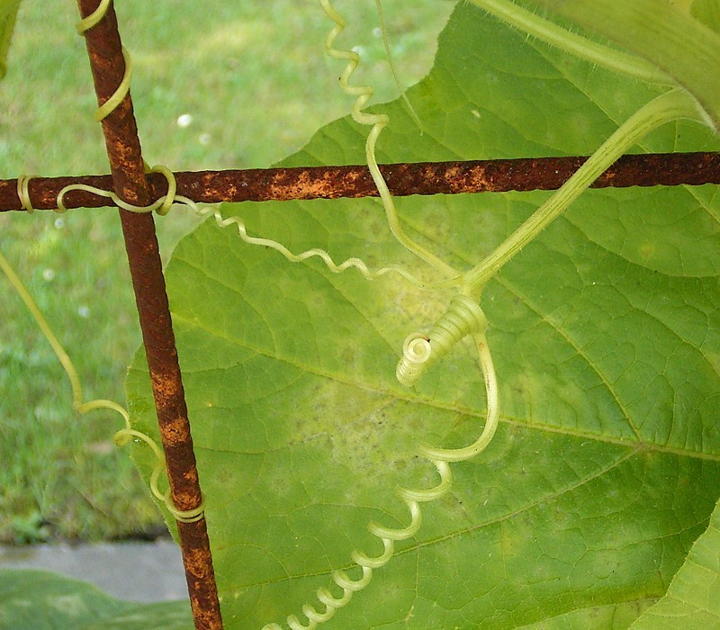 Cucurbita pepo